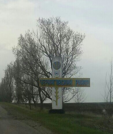 Запорізька область. Автошлях Р37